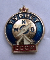 Значок "Турист СССР"